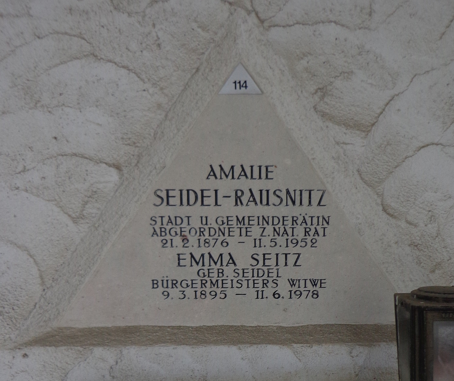 Feuerhalle Simmering - Arkadenhof (Abteilung ALI) - Urnengrab der sozialdemokratischen Frauenrechtlerin Amalie Seidel (seit 1938 Seidel-Rausnitz) und ihrer Tochter Emma, zweite Ehefrau des Wiener Bürgermeisters Karl Seitz